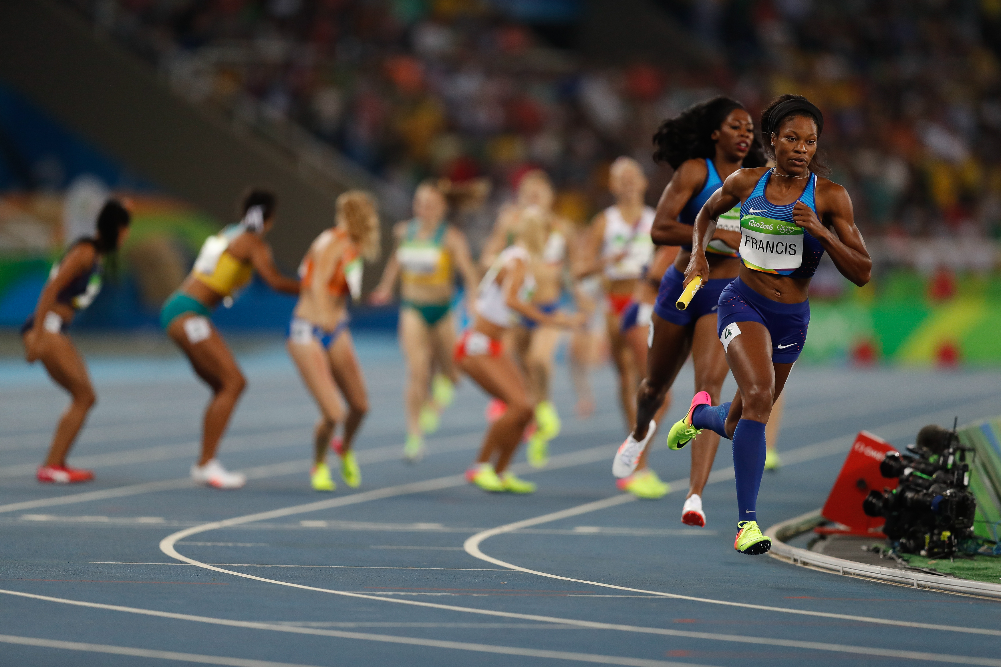 Rio de Janeiro - Eliminatórias do revezamento 4 x 400m nos Jogos Rio 2016, no Estádio Olímpico (Fernando Frazão/Agência Brasil)